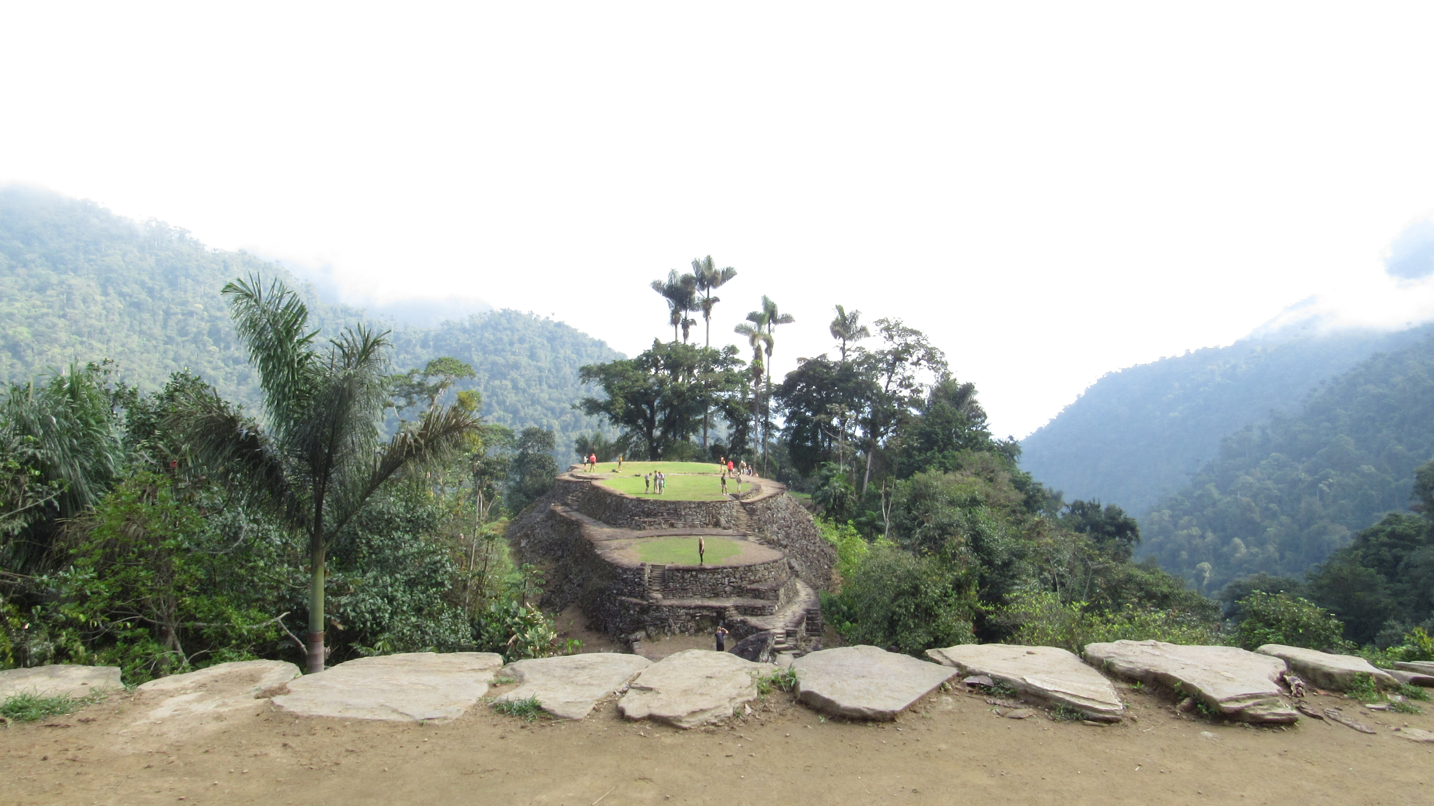 Vista hacia las bases y terrazas de piedra donde los indígenas de la Sierra Nevada de Santa Marta guardaban sus más preciadas pertenencias para protegerlas del saqueo. Esta fotografía fue tomada en un área protegida de Colombia con el código 47001 del RUNAP.